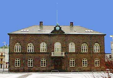 Alþingi,Reykjavík,Reykjavik,Althingi,Iceland,Island